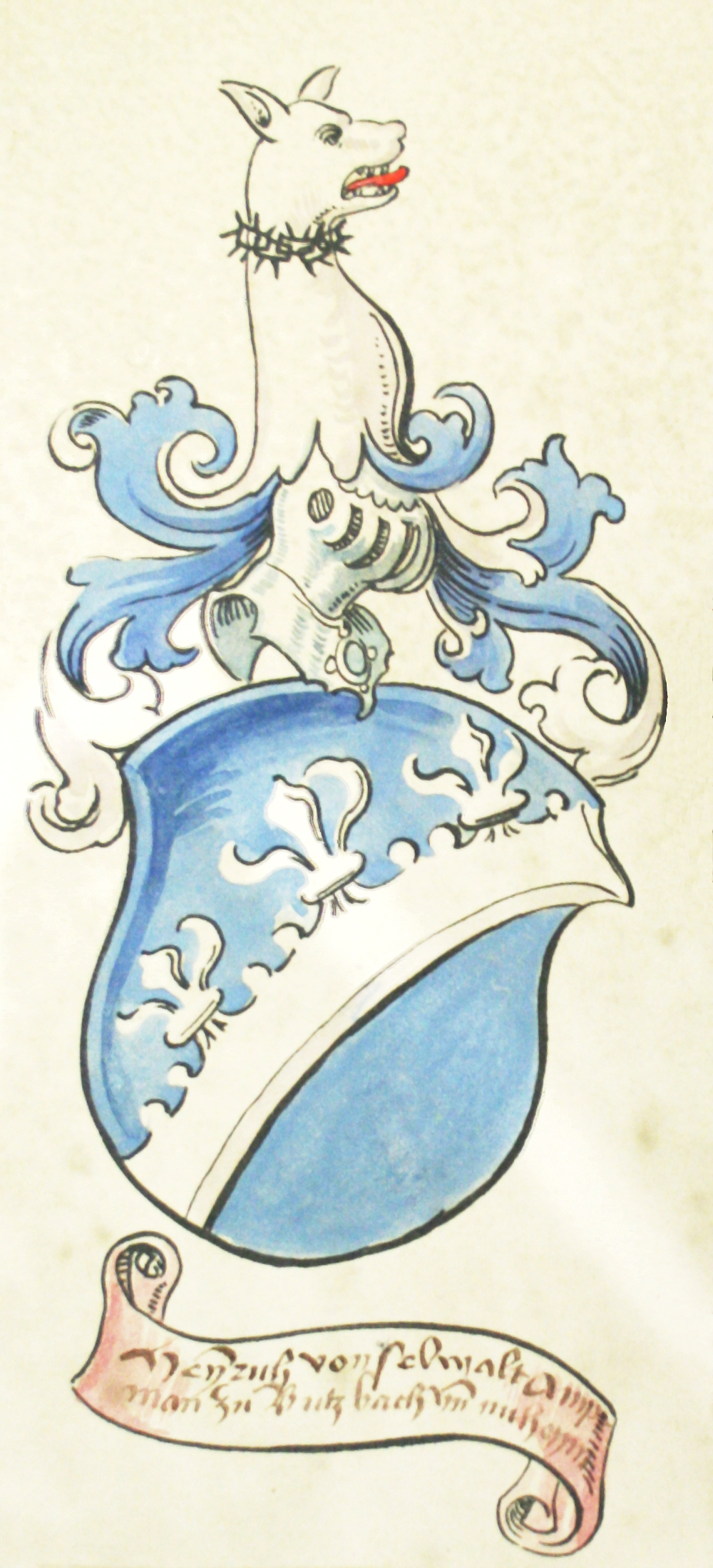 Wappen des Friedberger Burgmann Heinrich von Selbold im Salbuch des Kloster Naumburg, Buchmalerei des 16. Jahrhundert. Schriftband: Heynrich von selwalt Amptman zu Butzbach und nuheym.